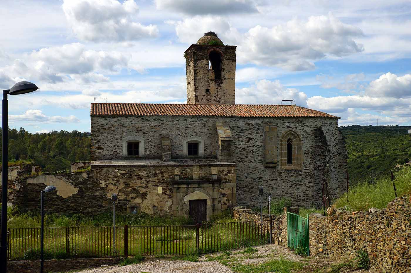 Iglesia de la Encarnación, Alcántara, provincia de Cáceres, España.